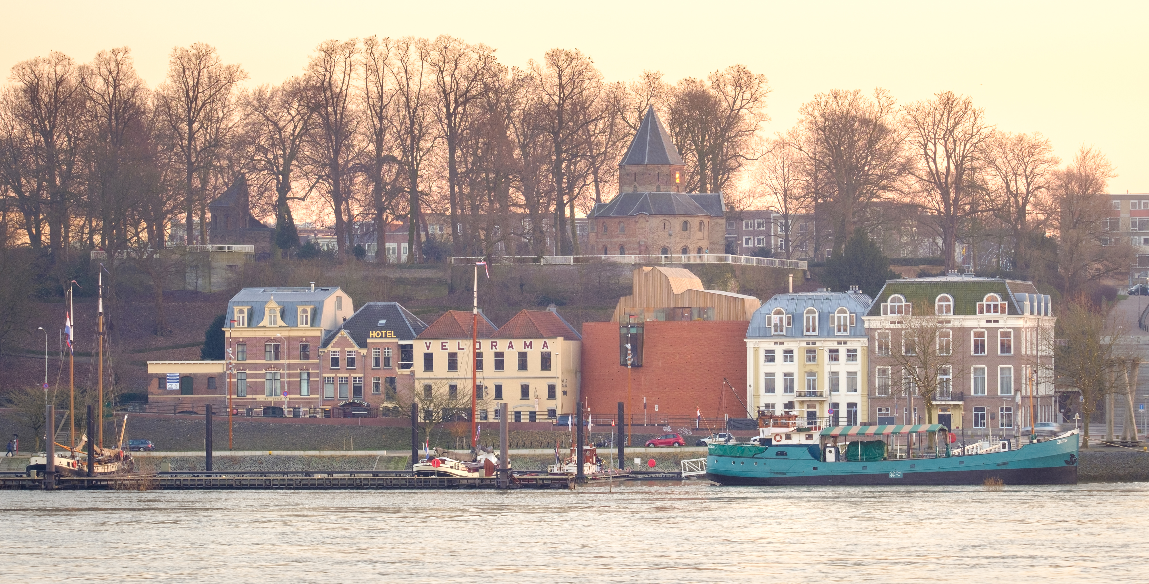 Het ronde gebouw met erker is de nieuwe bastei aan de oostelijke Waalkade in Nijmegen. Het gebouw is op en rond een 16e eeuwse verdedigingstoren gebouwd (de vroegere Stratemakerstoren). Architecten: Van Roosmalen en van Gessel, Delft. Fotograaf: Peter Eekelder